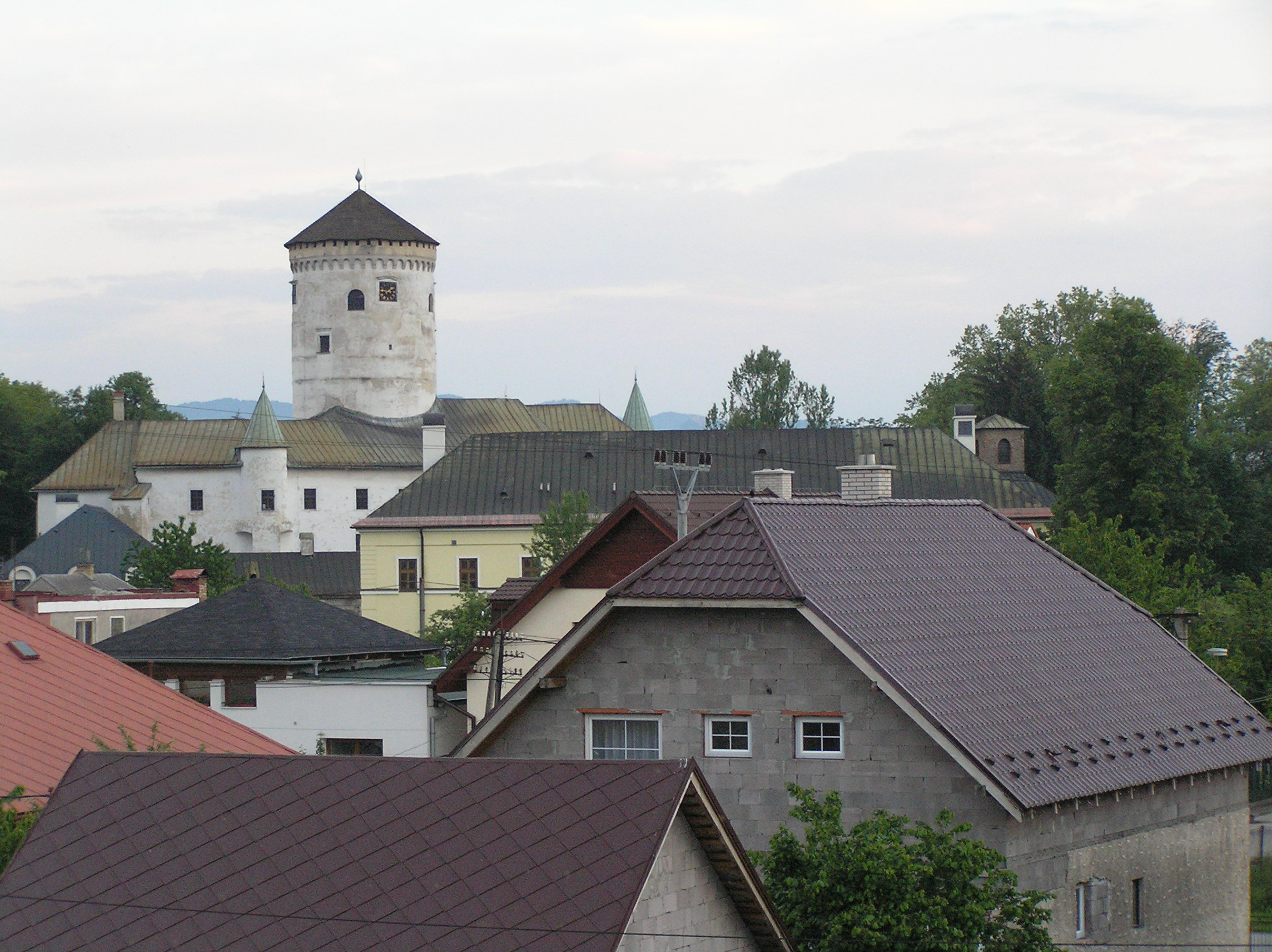 Budatínska veža z budatínskeho mosta Budatín, Žilina